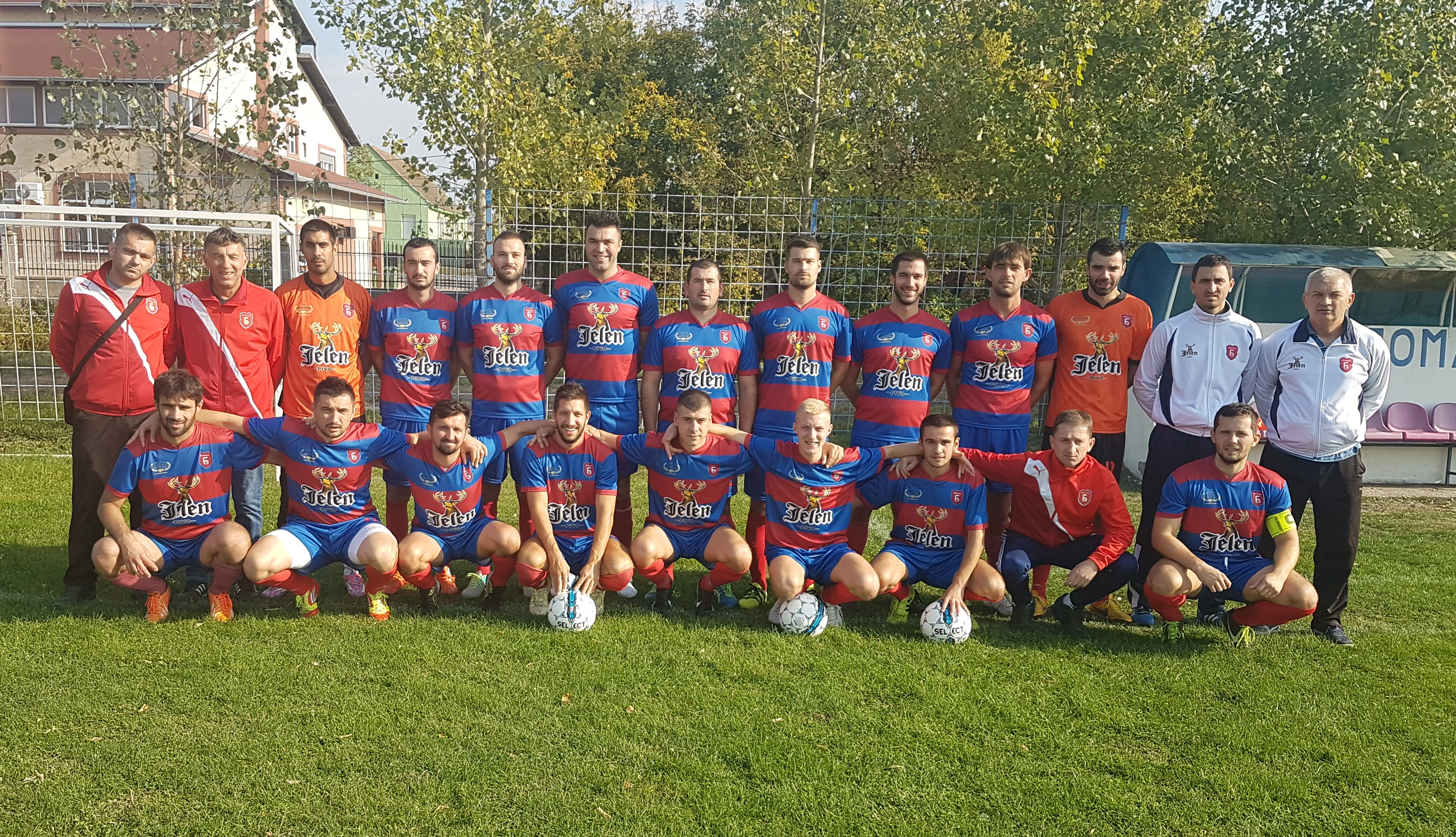 FK Busije, tim 2017/18